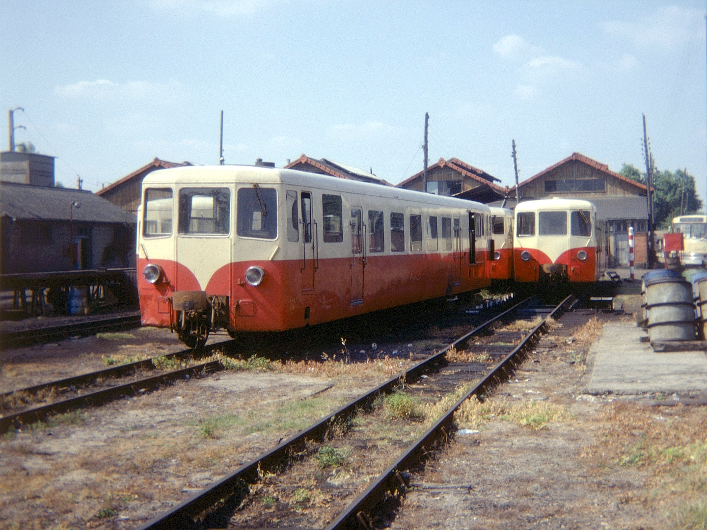 Des autorails Verney du chemin de fer du Blanc-Argent stationnent au dépôt de Romorantin le 18 juillet 1976.